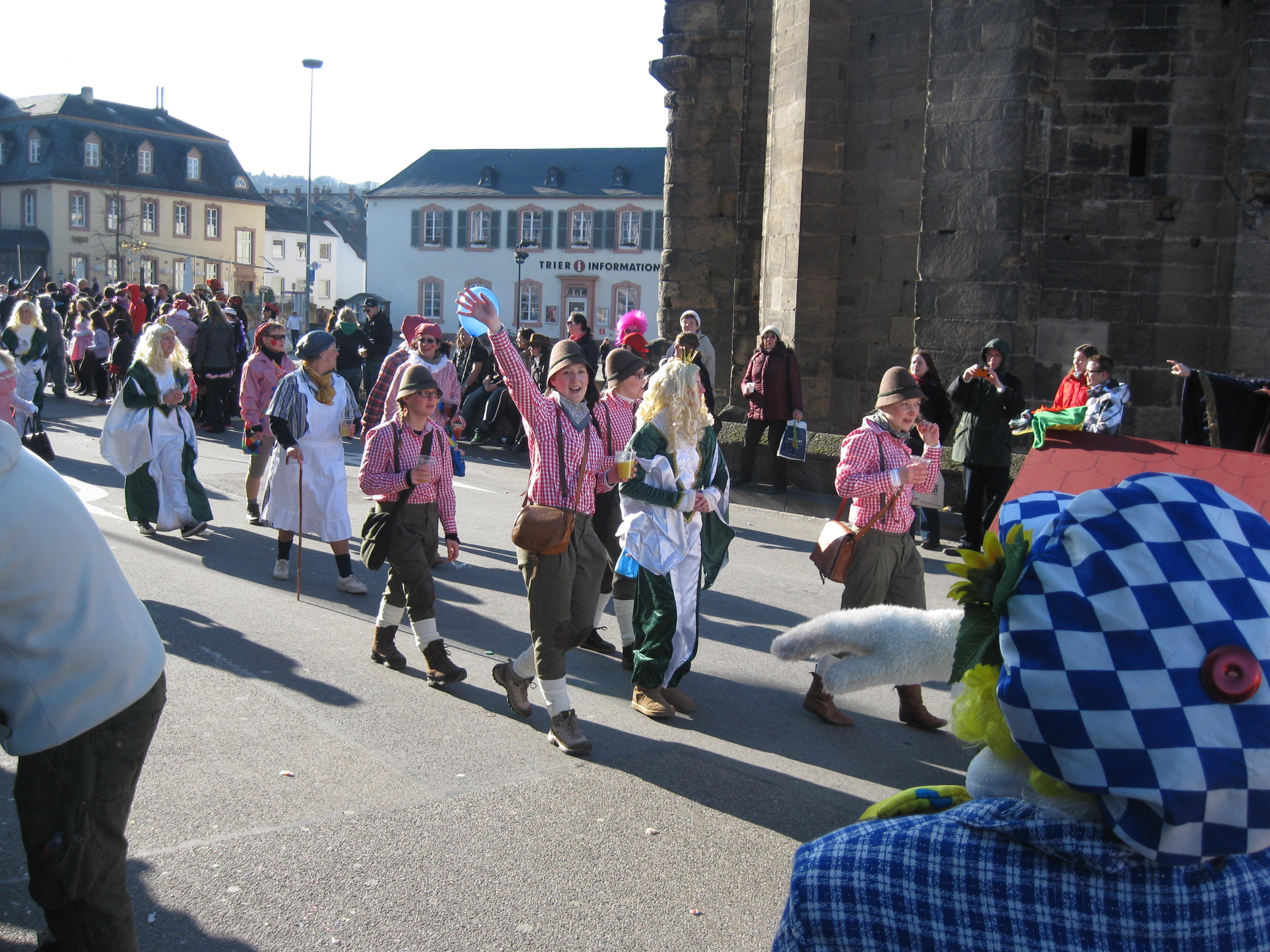 Großer Karnevalsumzug in Trier am Rosenmontag 2011